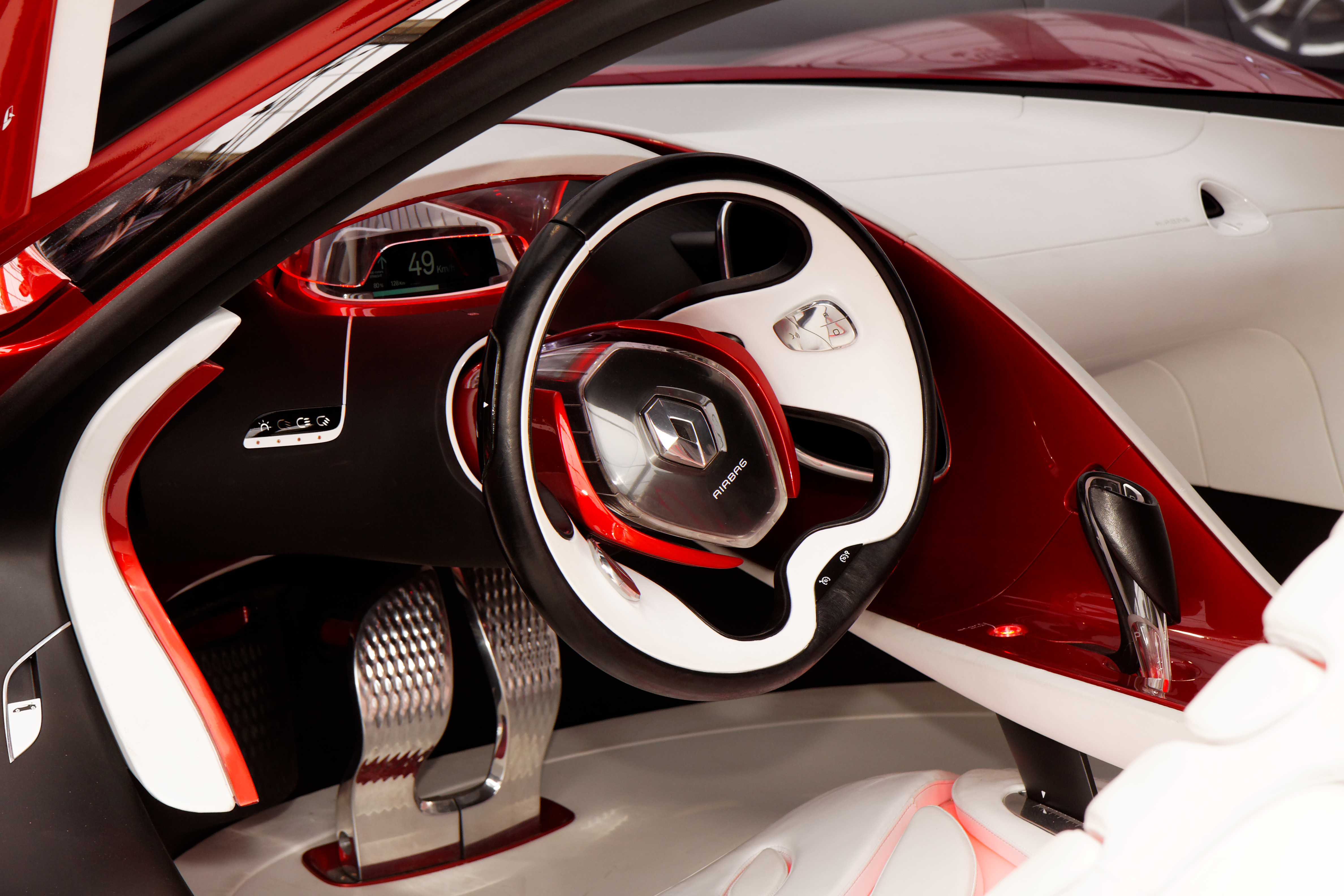 La Renault Dezir exposée devant le dôme des Invalides lors du festival automobile international 2011.